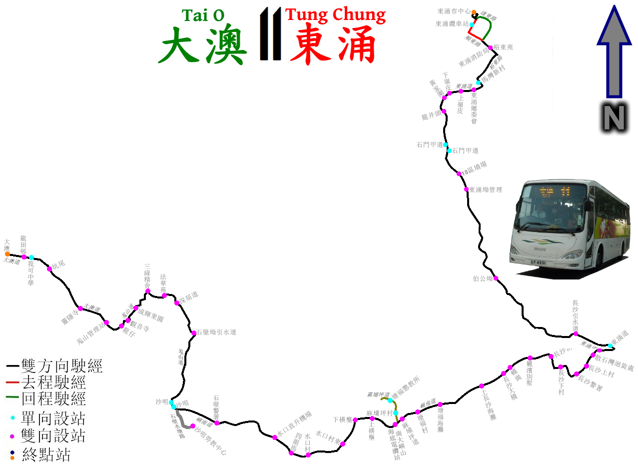 中文（香港）: 新大嶼山巴士11路線的走線圖